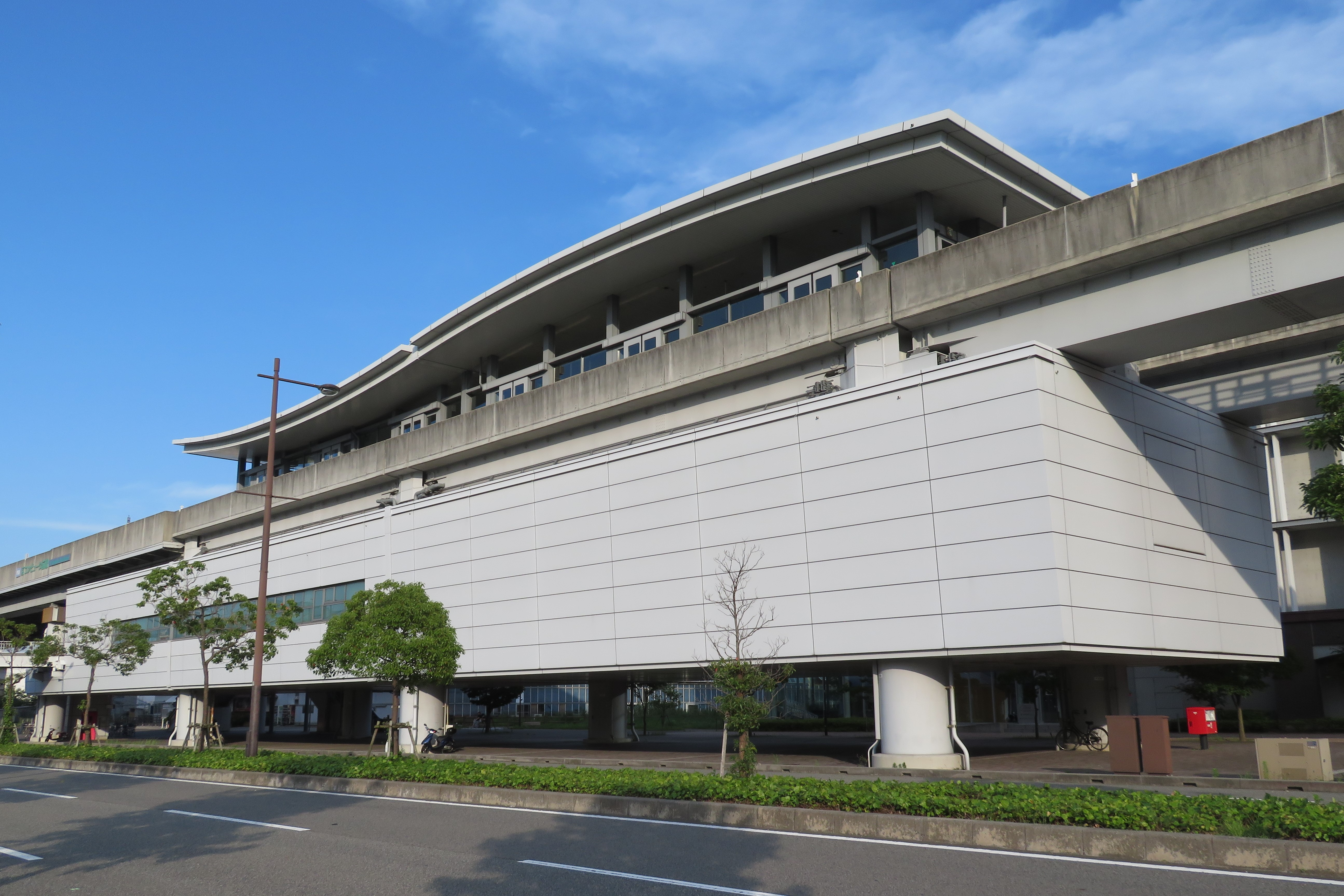 ポートライナー京コンピュータ前駅